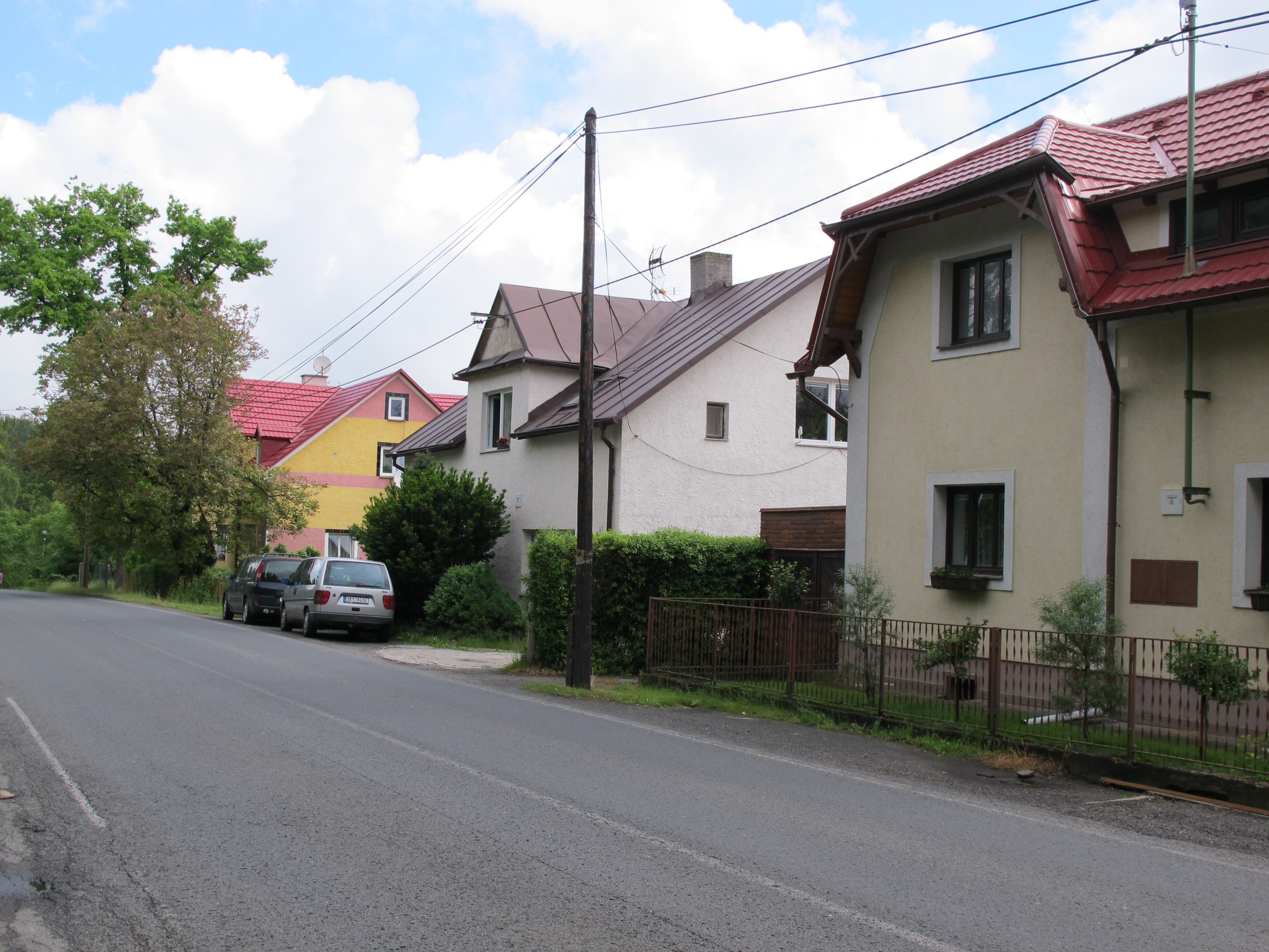 Skláře - průjezdní silnice, zprava domy čp. 34, 25 a 31. This image was acquired during the event Wikiměsto Mariánské Lázně.